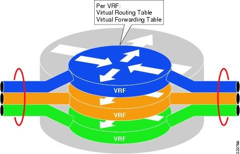 Монгол: Зураг 1.